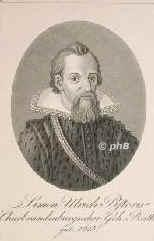 Kupferstich-Portrait von Friedrich Jügel